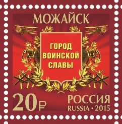 Почтовая марка. Можайск. Город воинской славы. На почтовой марке изображены: 1. Самолёт У-2ВС; 2. 12-фунтовая пушка; 3. Противотанковые ежи.